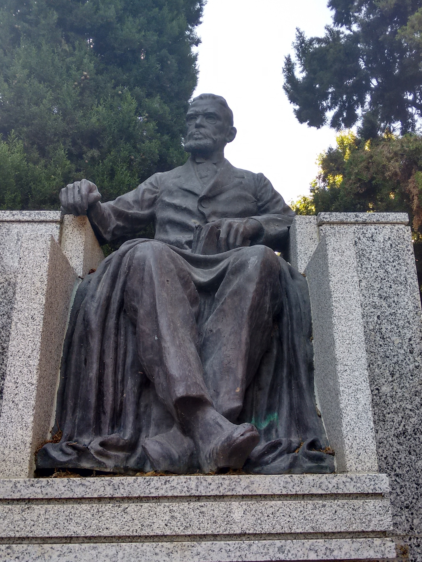 Estatua de Machado de Assis